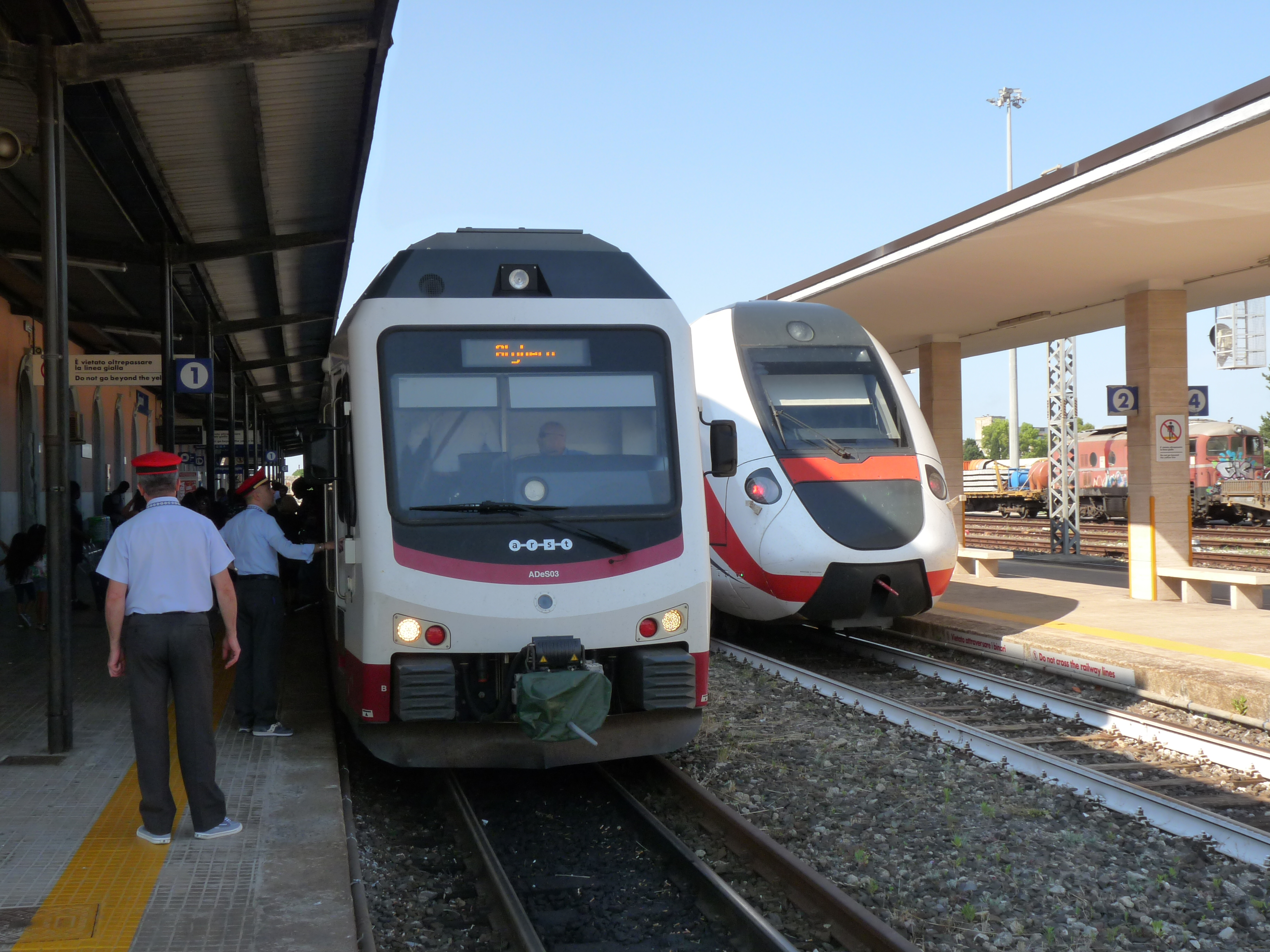 Het station Sassari in 2018